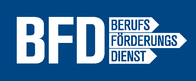 Neues Logo der Berufsförderungsdienstes der Bundeswehr